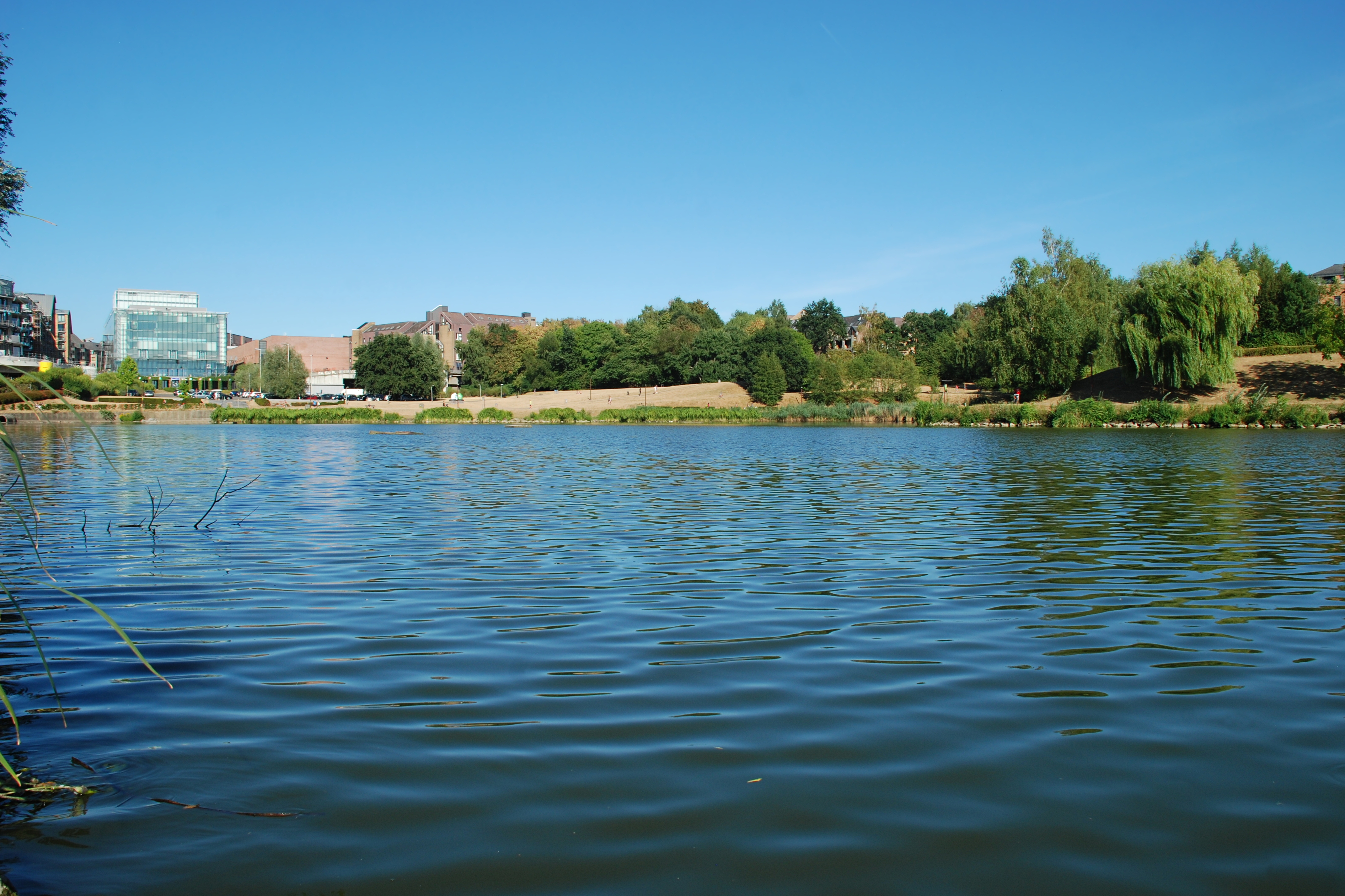 Belgique - Brabant wallon - Ottignies-Louvain-la-Neuve : l'Aula Magna au bord du lac de Louvain-la-Neuve This photo of immovable heritage has been taken in the Walloon Region